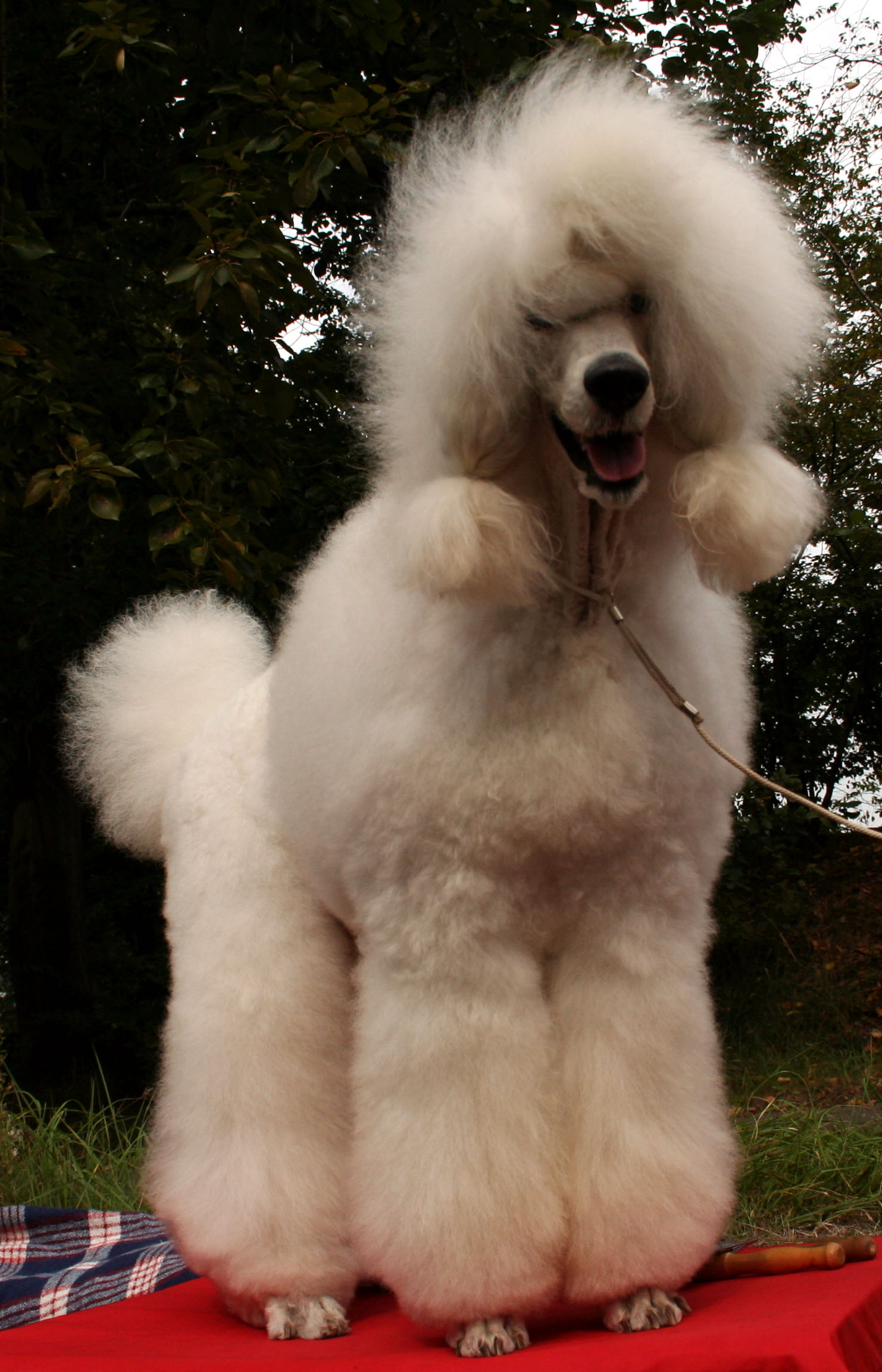 Pudel olbrzymi biały na krajowej wystawie w Rybniku - Kamieniu.